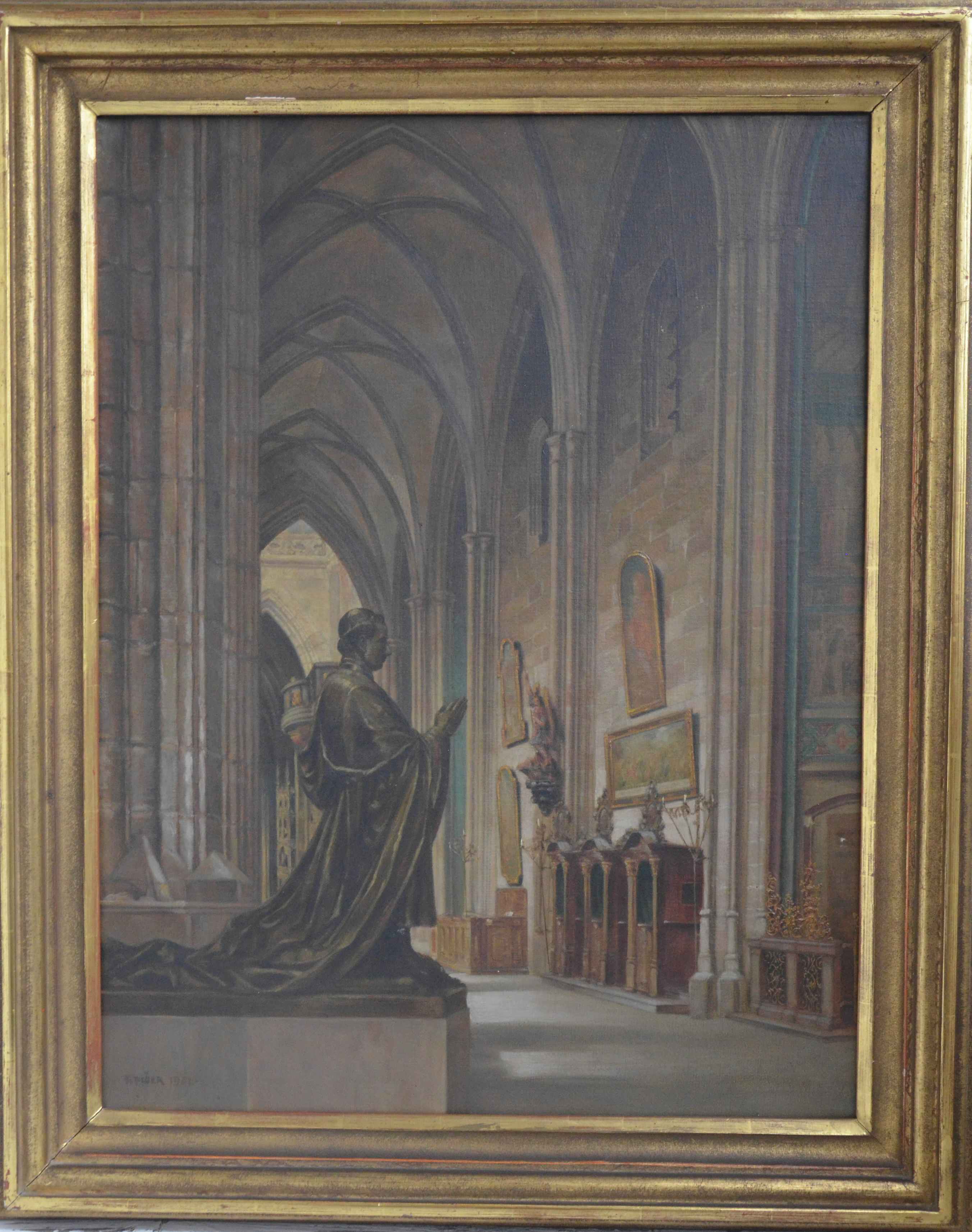 Katedrala sv. Vita